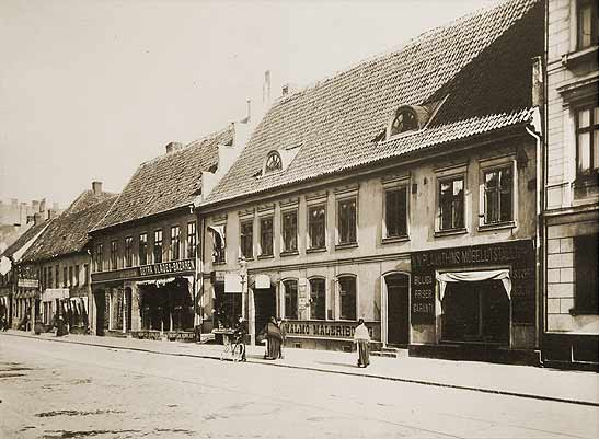 Niels Kuntzes hus ut mot Östergatan på 1880-talet. The building “Niels Kuntzes hus” in Malmo, Sweden about 1530. The mayor Niels Kuntzes house in Malmo, Sweden, about 1530.